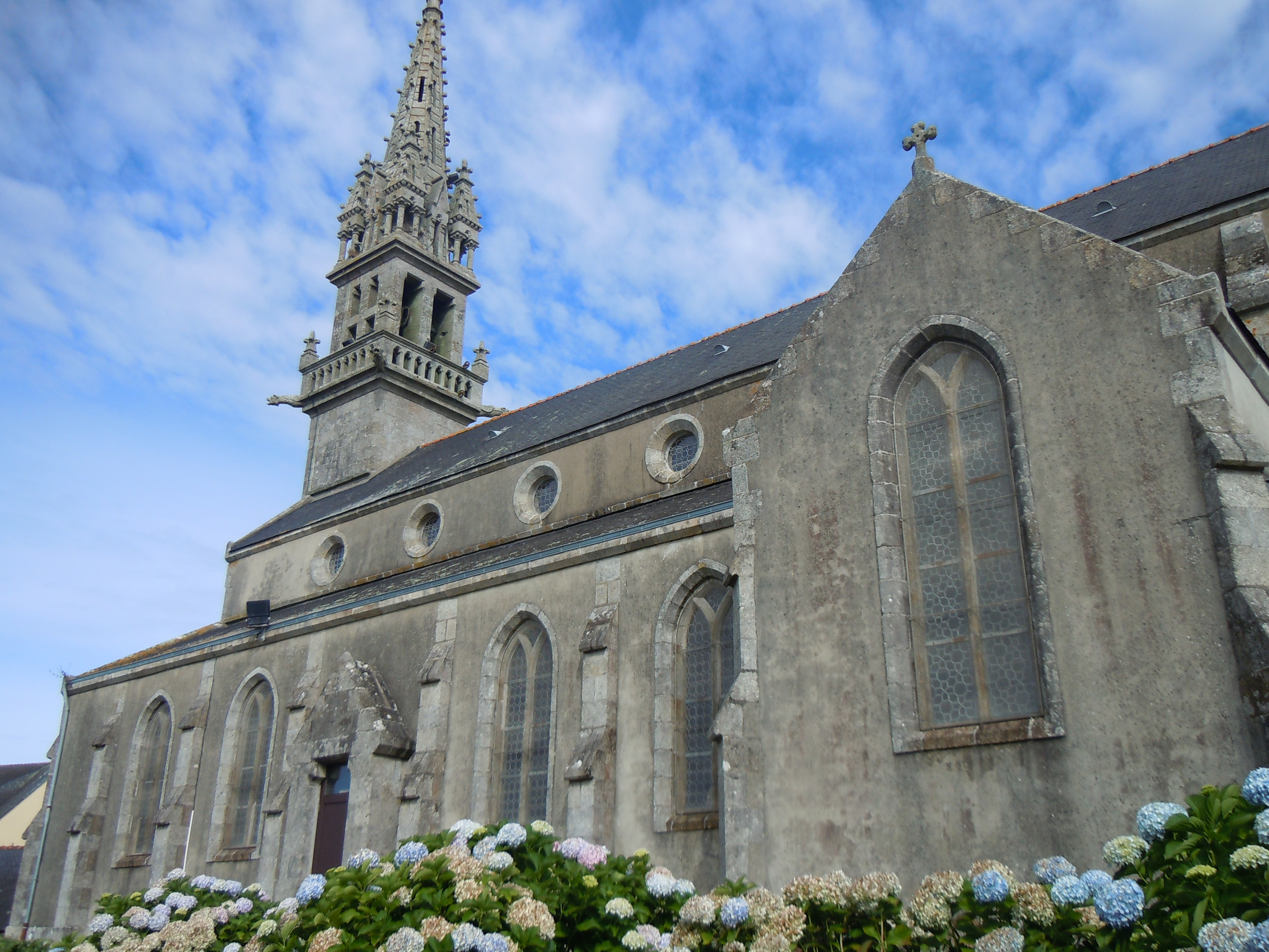 façade méridionale de l'église paroissiale de Saint-Thurien (Finistère)